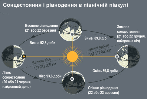 Сонцестояння